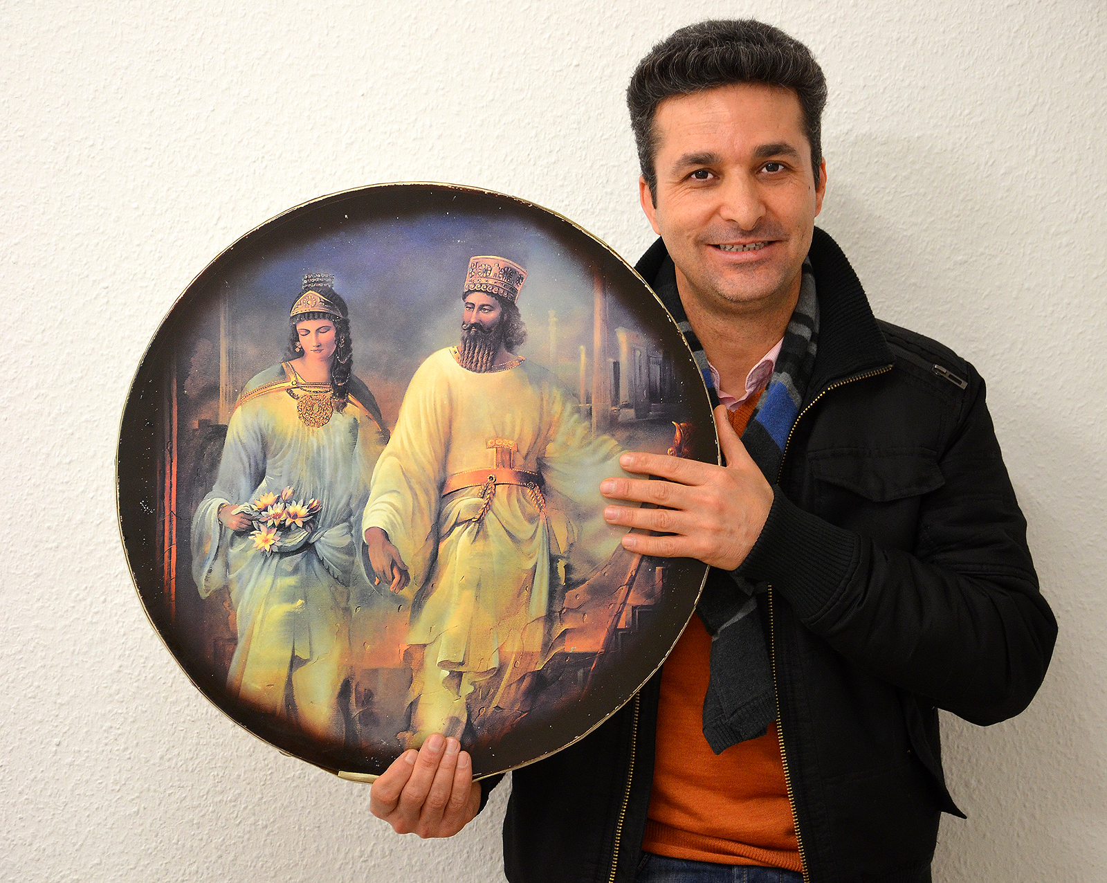 Nach seinen musikalischen Darbietungen anlässlich des Besuches des Freundeskreises Hannover beim Verein Kargah e.V. präsentierte der Musiklehrer Hassan Hajilou auf besonderen Wunsch seine bemalte Daf (persische Rahmentrommel mit Schellenkranz) ...